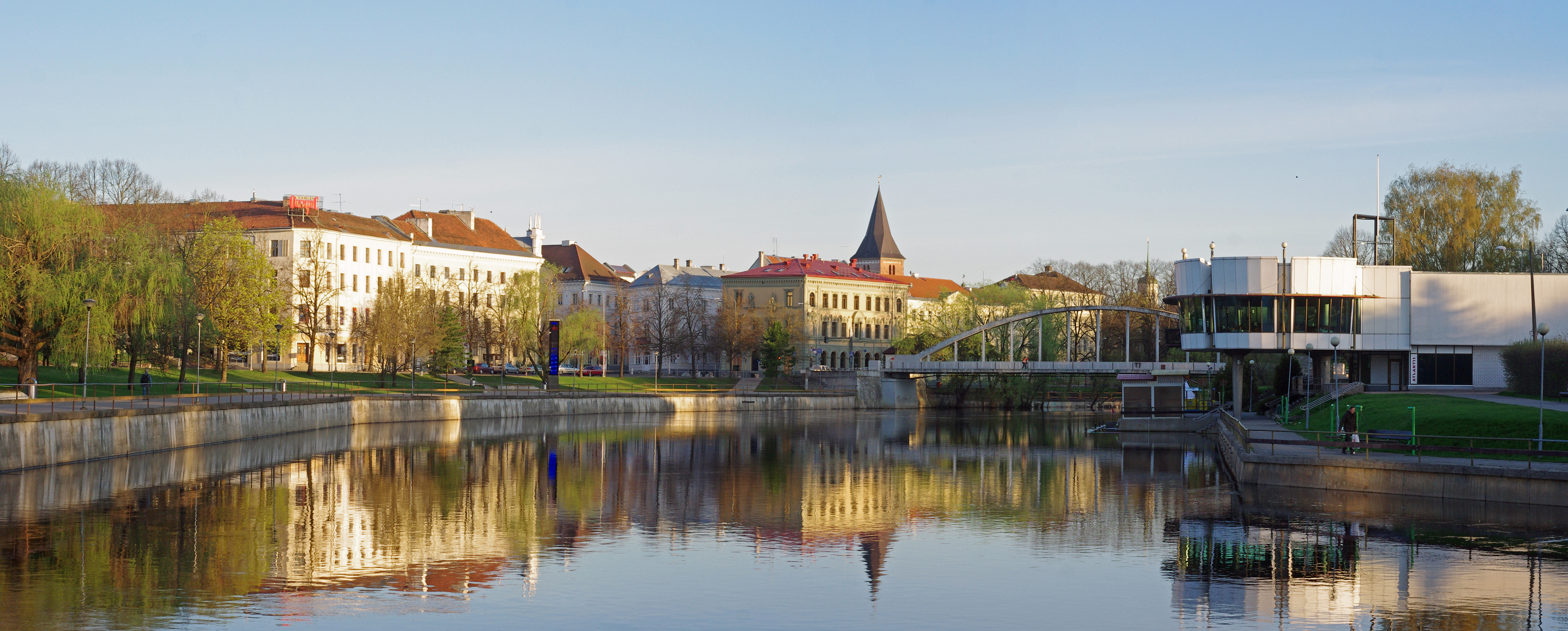 Tartu kesklinn 6. mail 2012